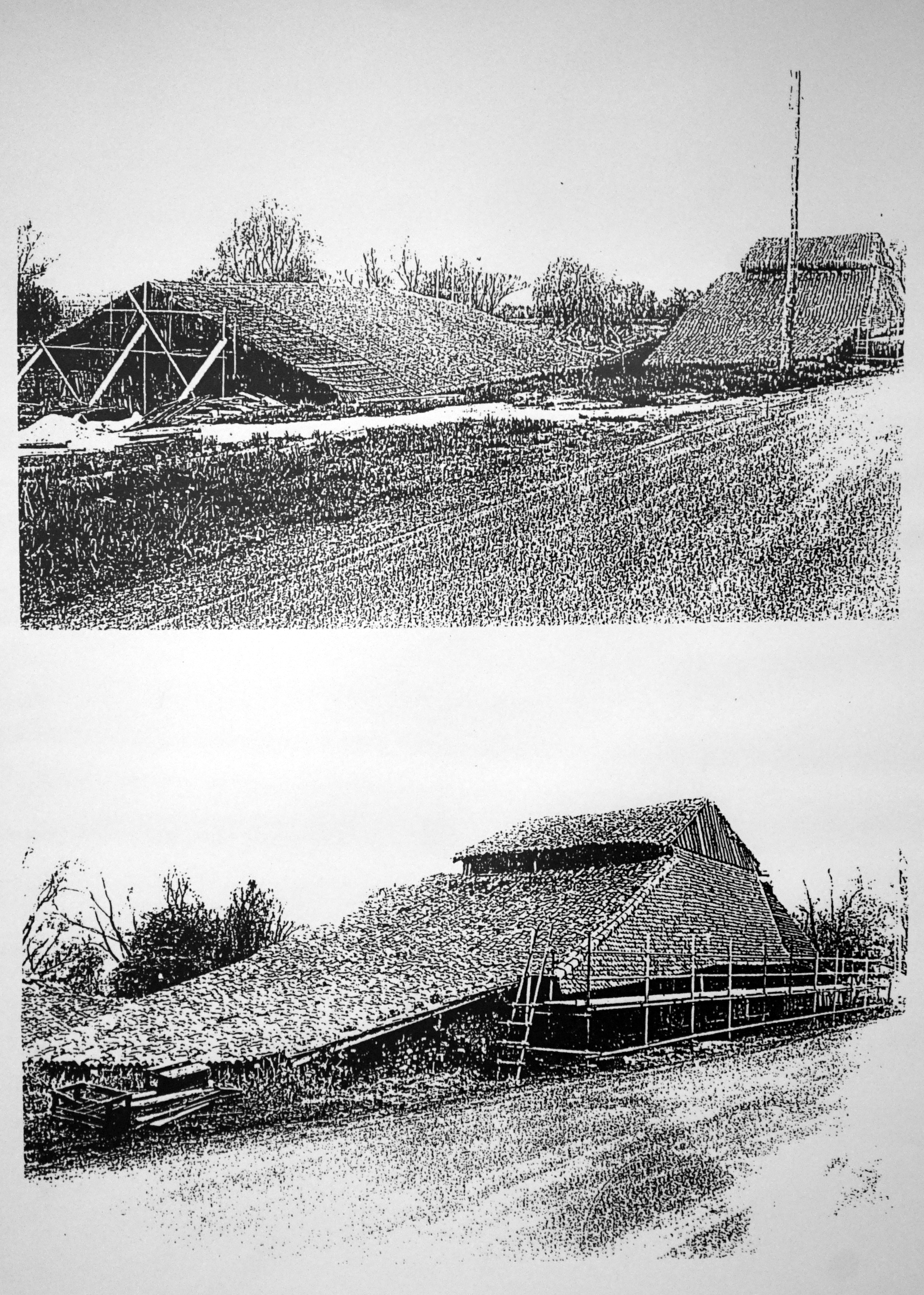 présenté au musée deToul.